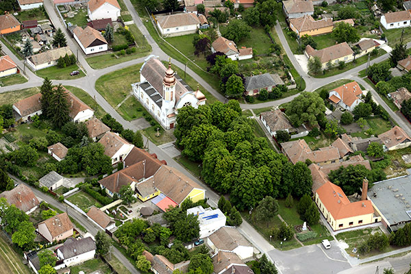 Légi fotó Zagyvarékasról